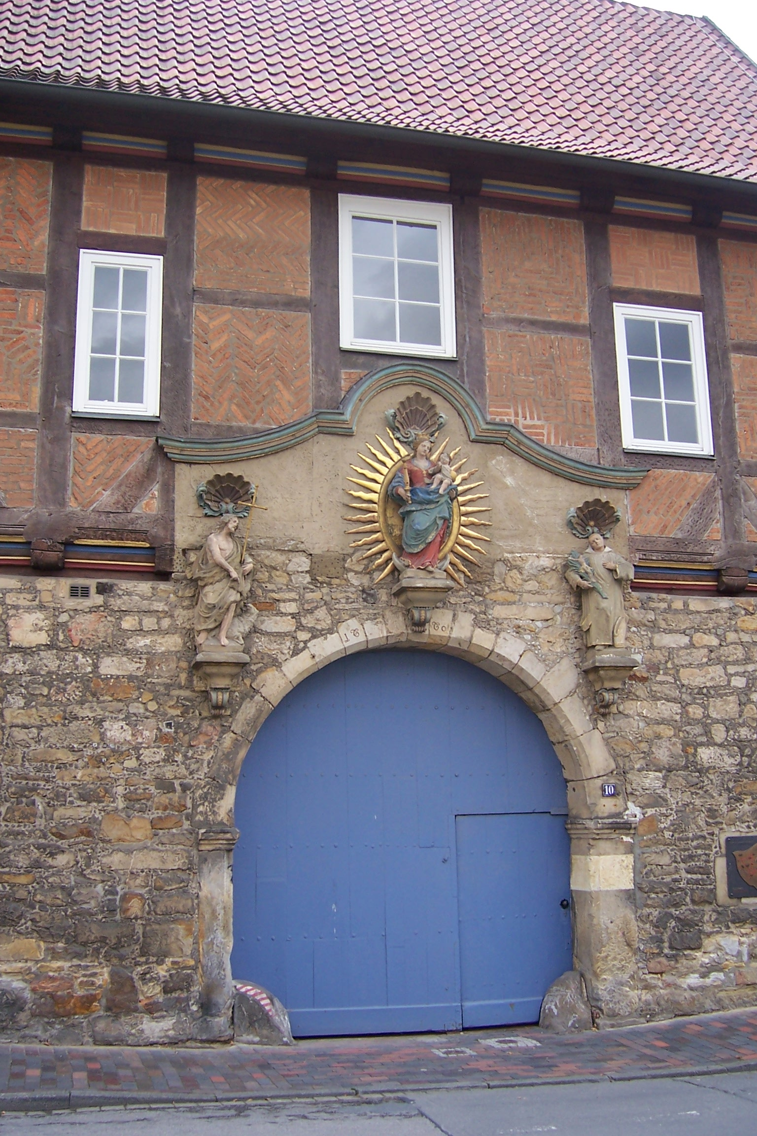 Karthause in Hildesheim.